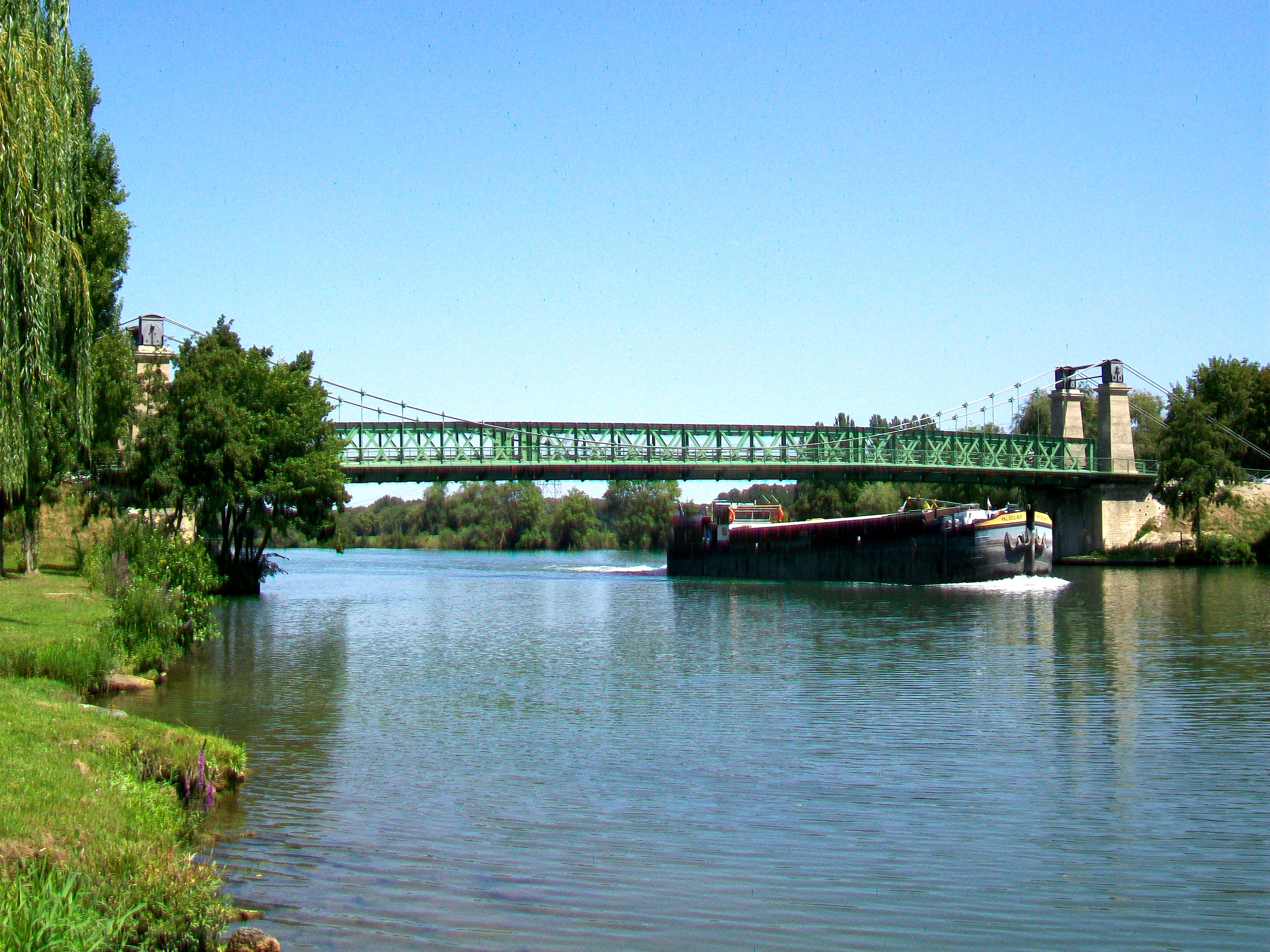 Boran-sur-Oise, passage d'une péniche en-dessous du pont suspendu de 1946.